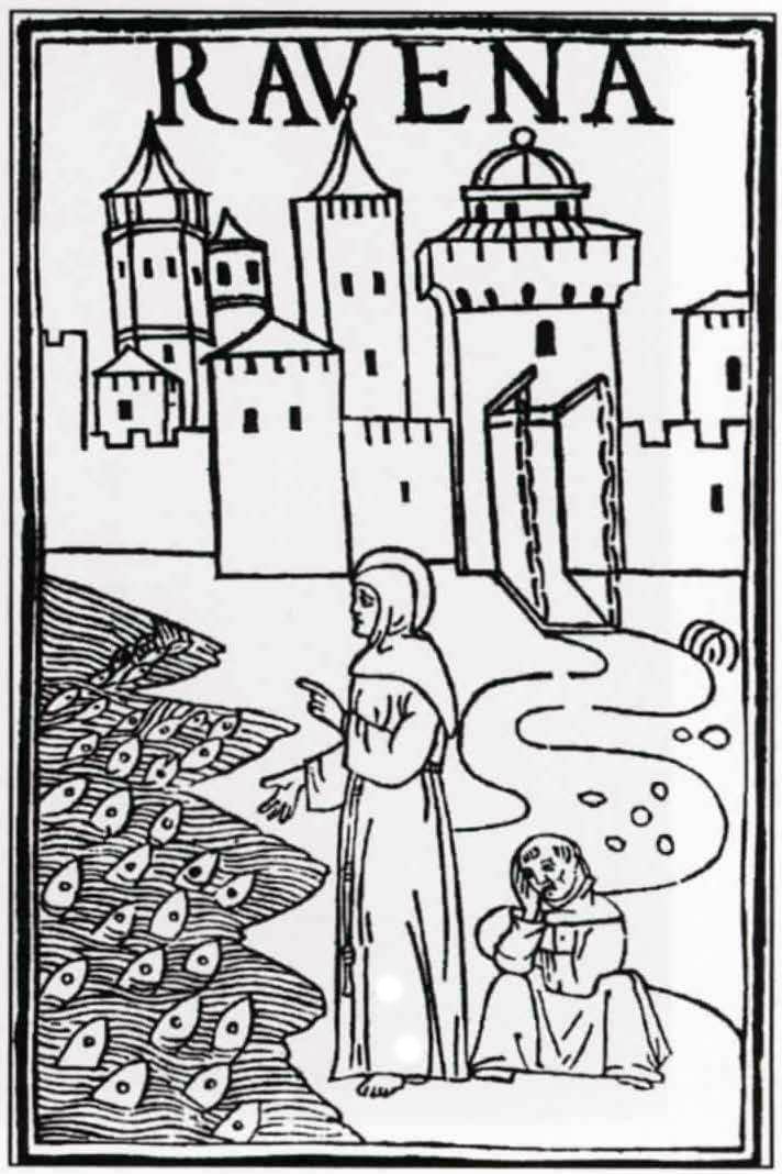 Sant'Antonio predica ai pesci. 1480 circ